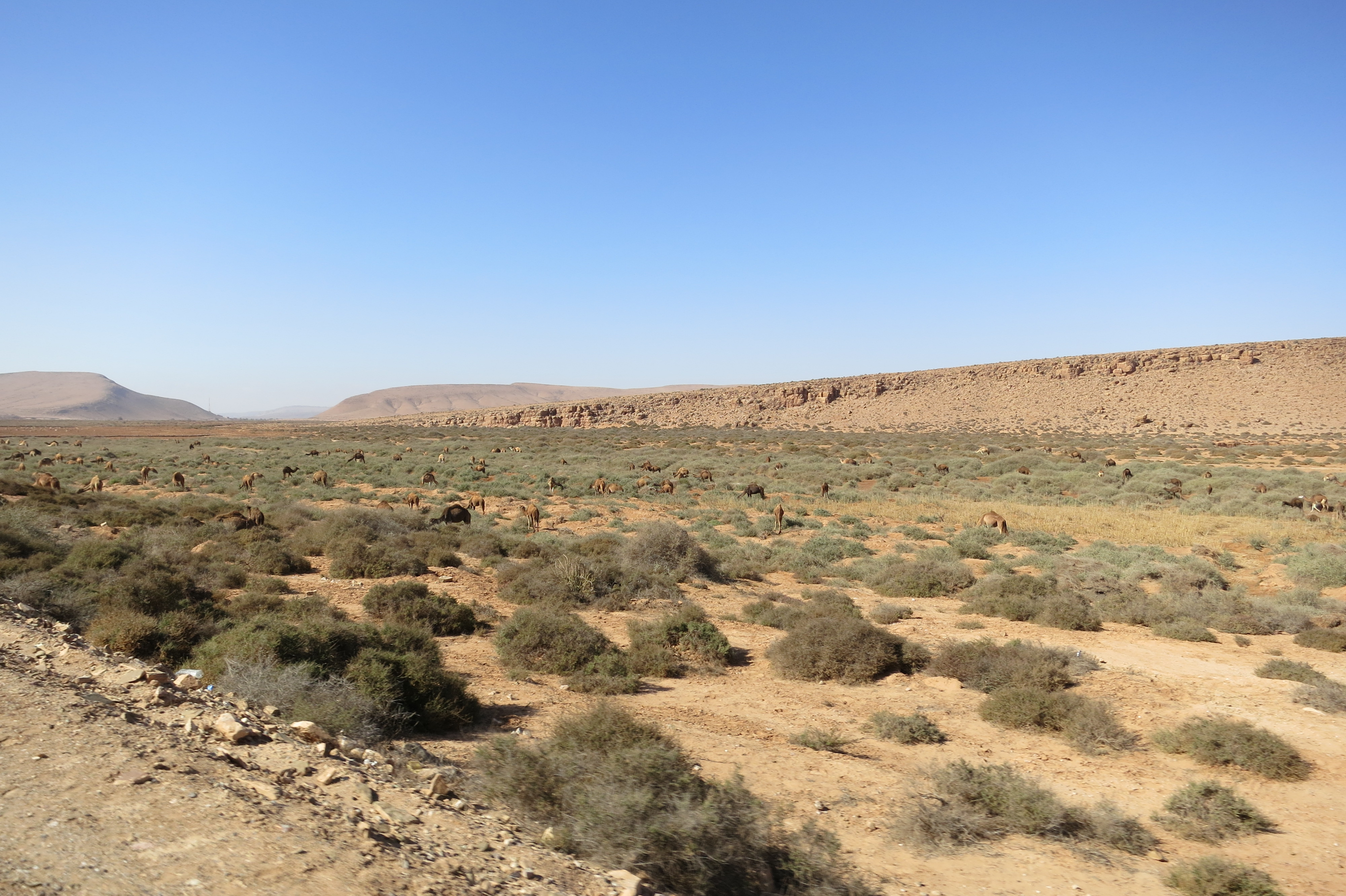 Camels